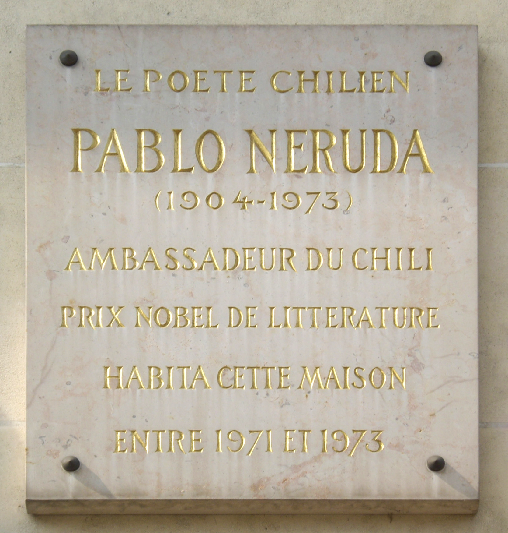 Plaque apposée au n° 2 de l'avenue de La Motte-Picquet, Paris 7e, où résida le poète et diplomate Pablo Neruda (1904-1973) de 1971 à 1973.